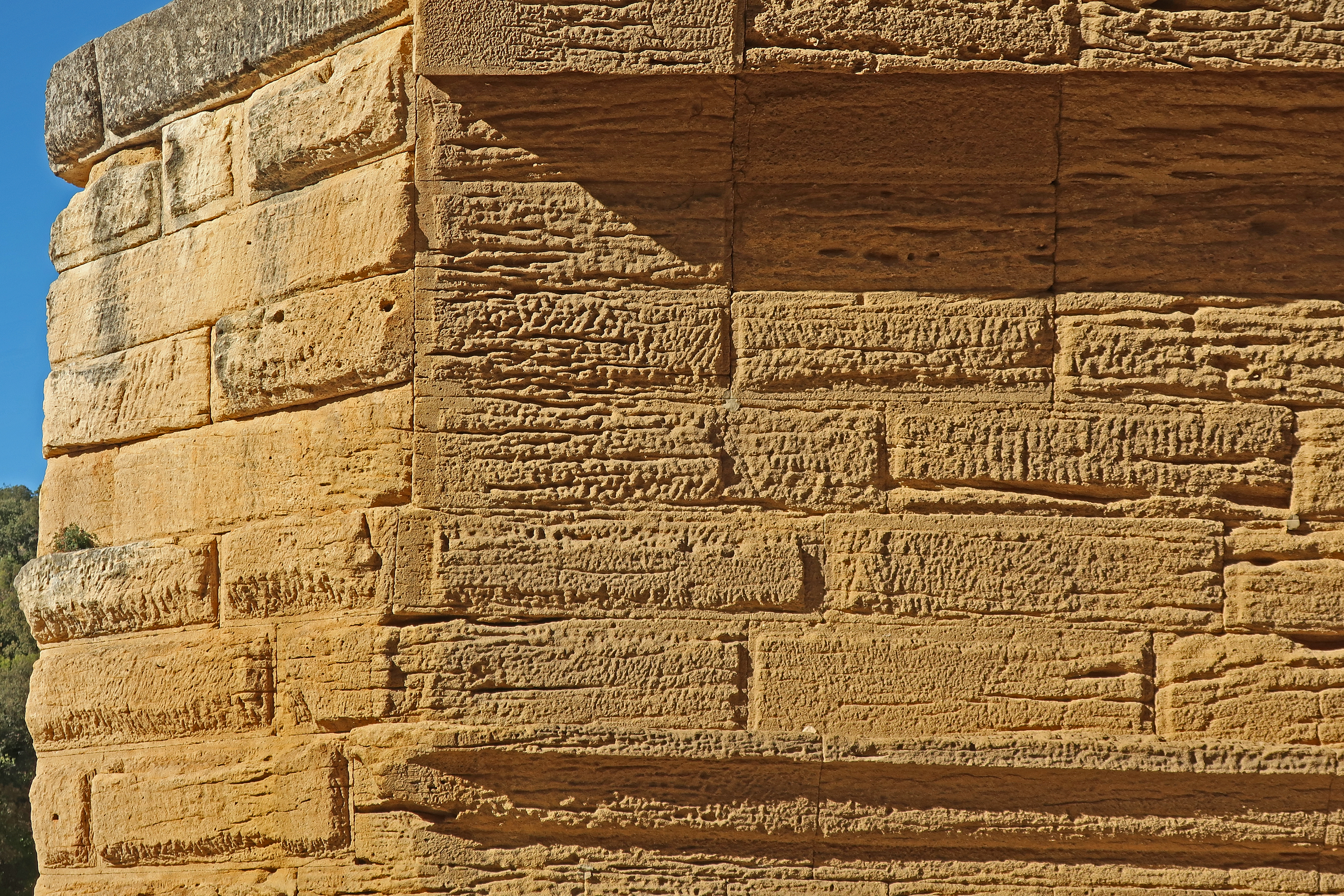 Pont du Gard, Détail